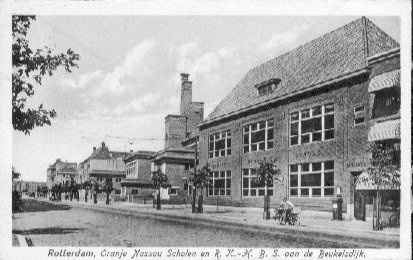 De Beukelsdijk in Rotterdam. Foto van prentbriefkaart verzonden in 1933, fotograaf onbekend. Beukelsdijk, Rotterdam (Delfshaven), 1932